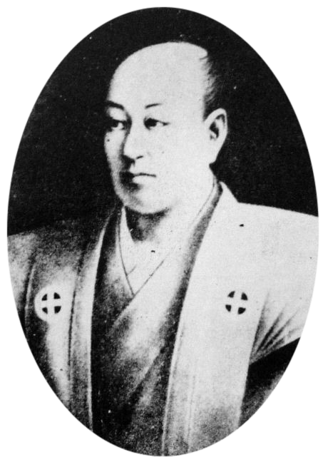 a Japanese man 島津斉彬 (Nariakira Shimazu)